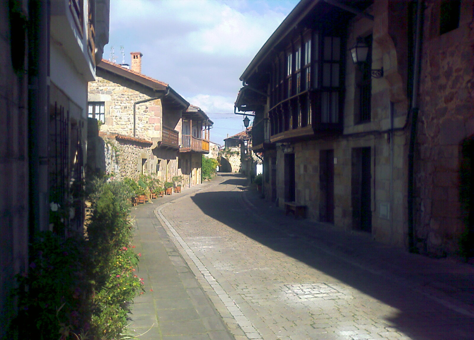 Cartes (Cantabria).